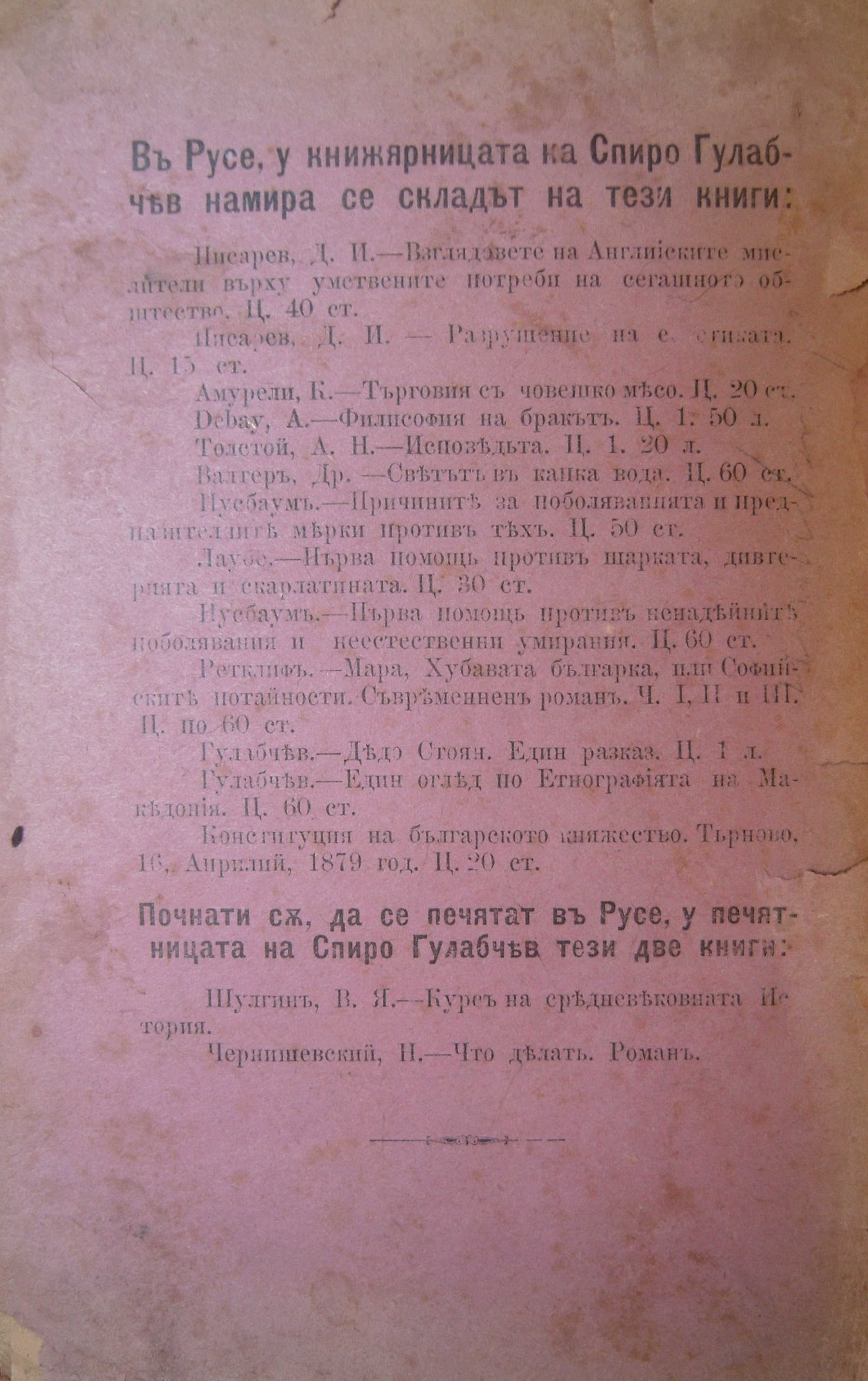 Реклама на Спиро Гулбачев в негова книга.